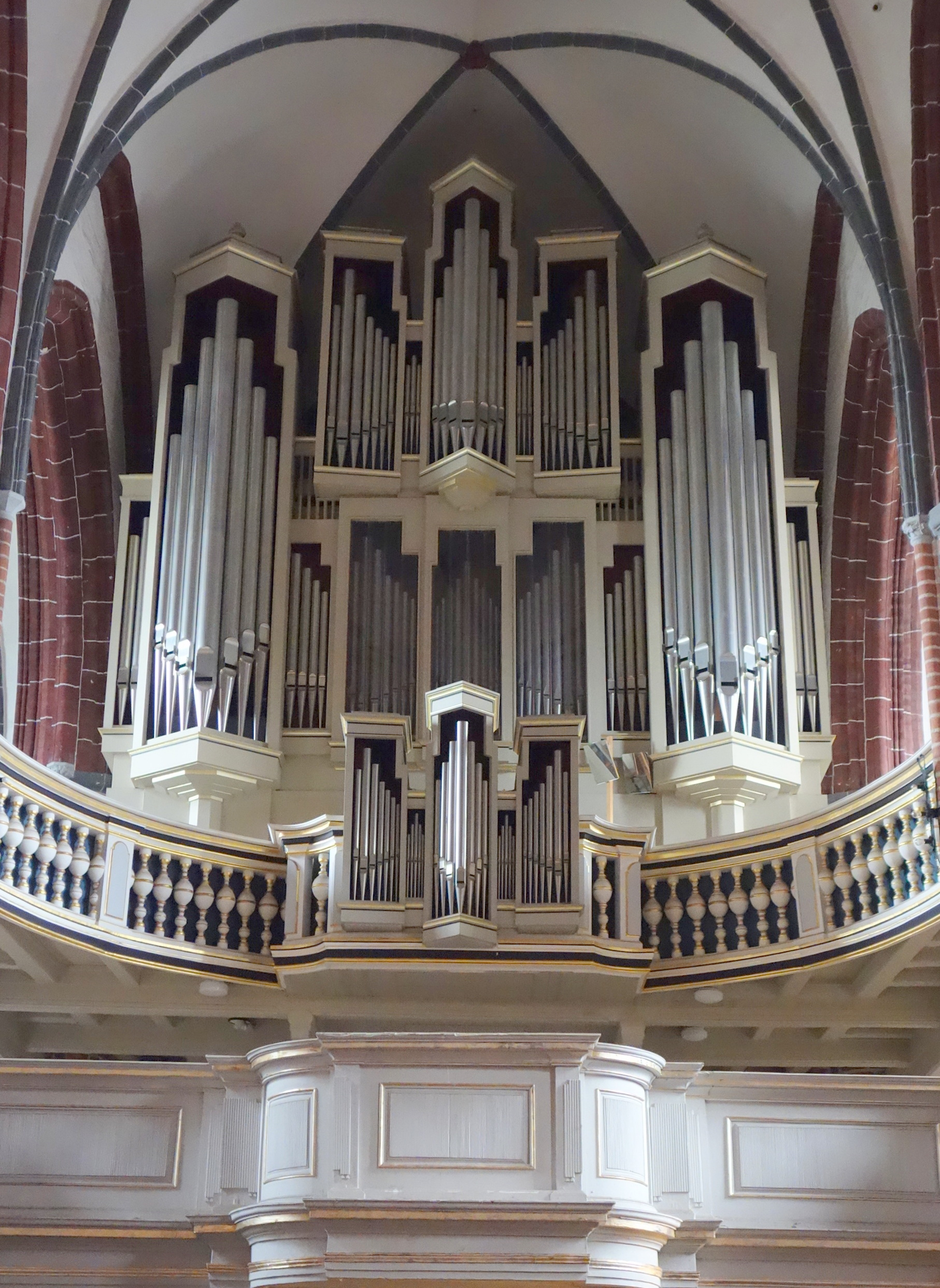 Orgel von St. Gotthardt, Brandenburg an der Havel, Brandenburg, Deutschland